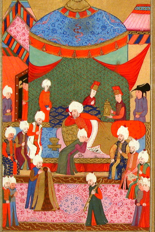 Secaatname 0279